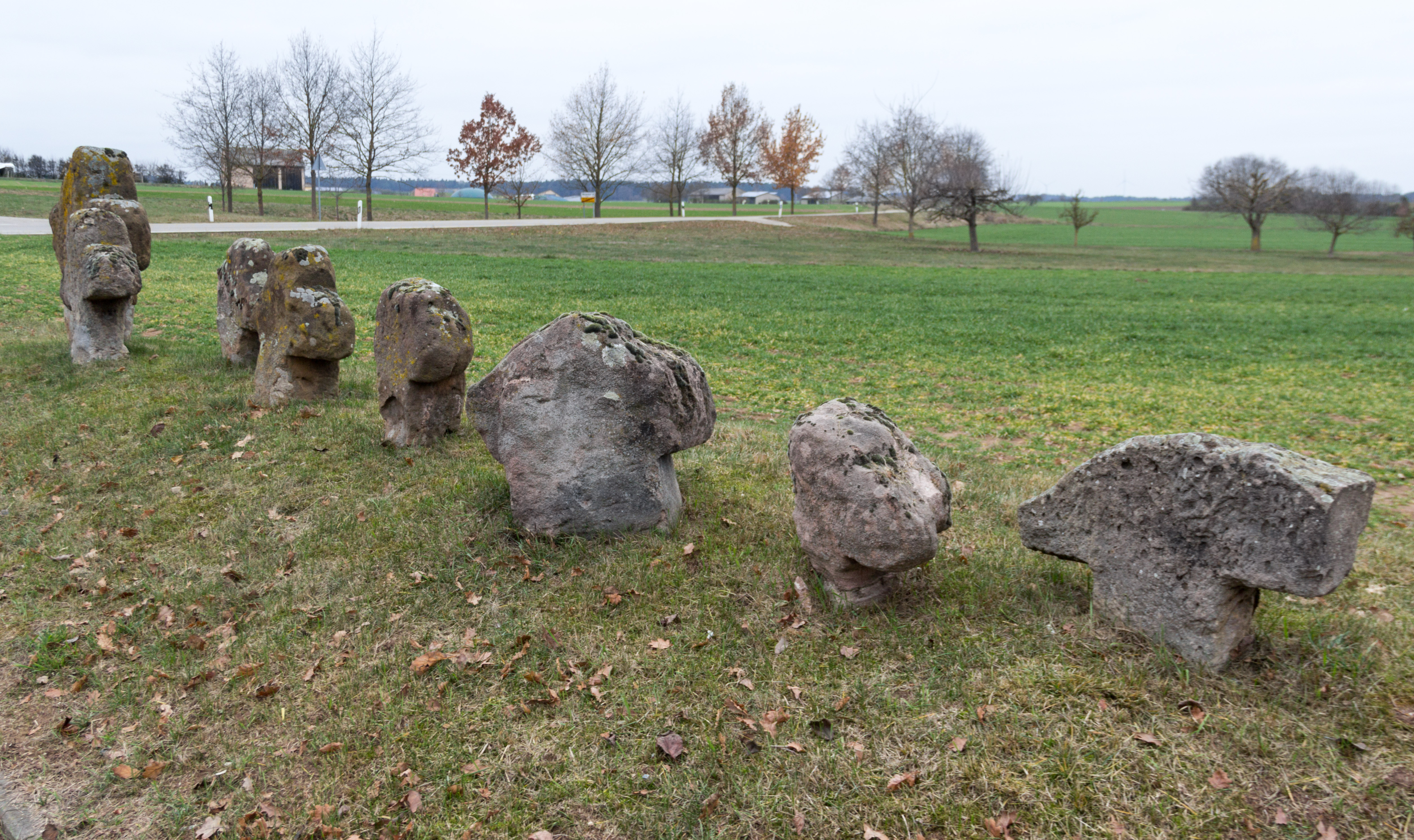 Steinkreuz, Wolframs-Eschenbach, Gruppe